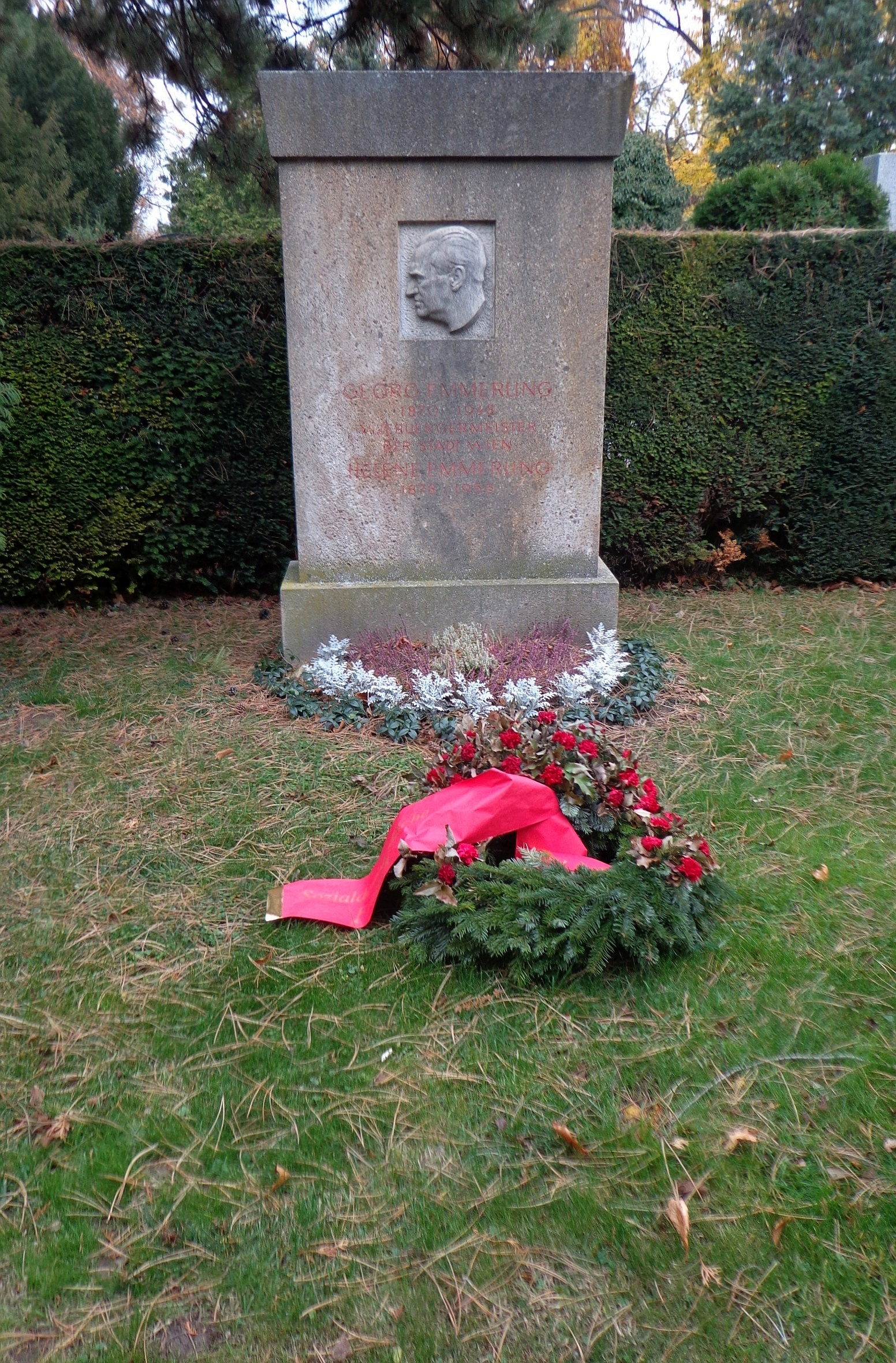 Wiener Zentralfriedhof - Gruppe 14 C, Ehrengrab von Georg Emmerling